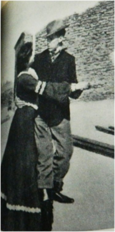 Compadrito dancig tango, 1907. Photo published by Caras & Caretas magazine in 1907. Republished in the book "El Compadrito: Su destino", several authors, ed. Emecé, Buenos Aires, 1945.Compadrito bailando tango en 1907. Foto publicada en la revista Caras y Caretas en 1907. Reproducida en el libro "El Compadrito: Su destino", varios autores, editorial Emecé, Buenos Aires, 1945.